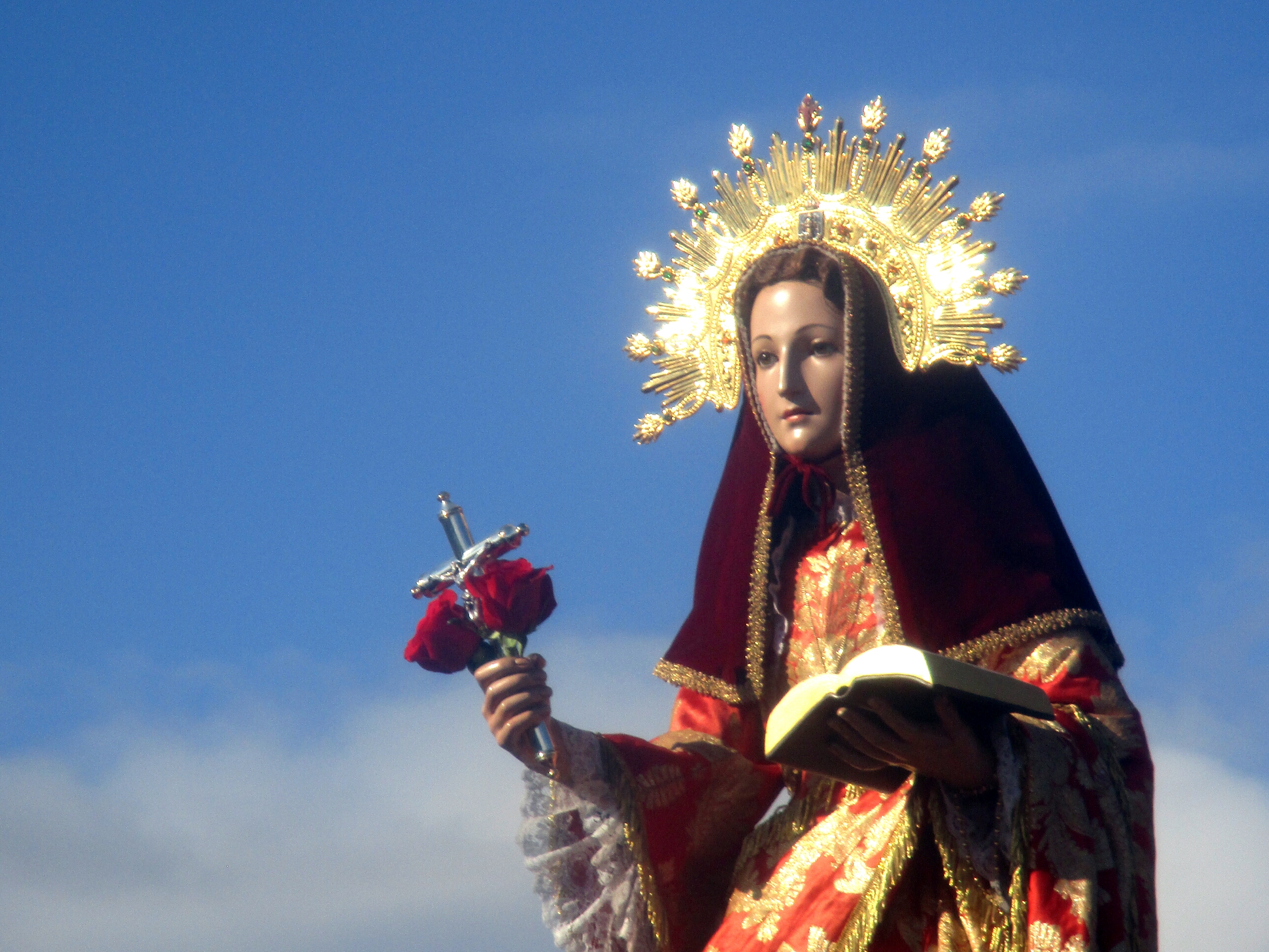 Santa Eulalia de Mérida, patrona de la ciudad de Totana (Murcia)